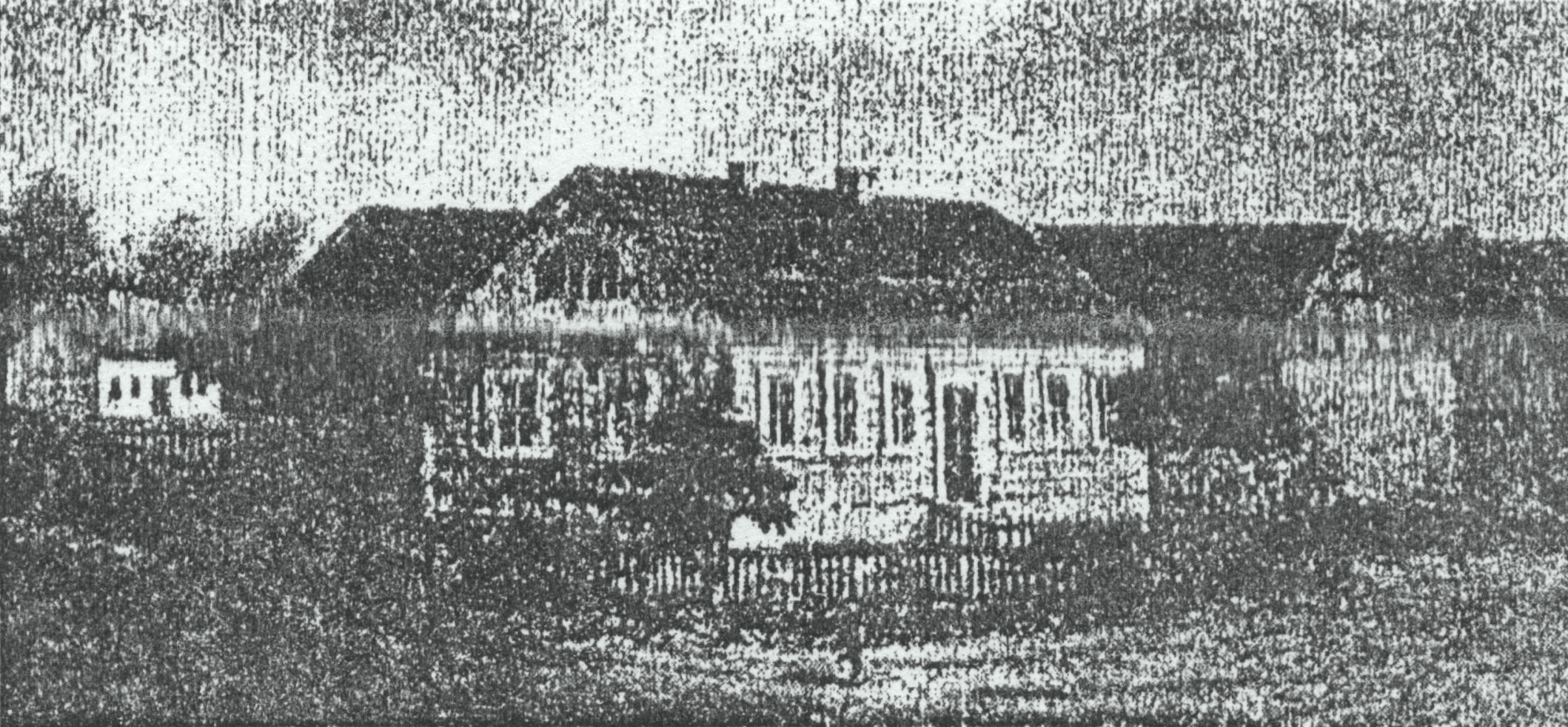 Schulgebäude in der heutigen Sohlener Straße 3 in Westerhüsen in den 1850er Jahren